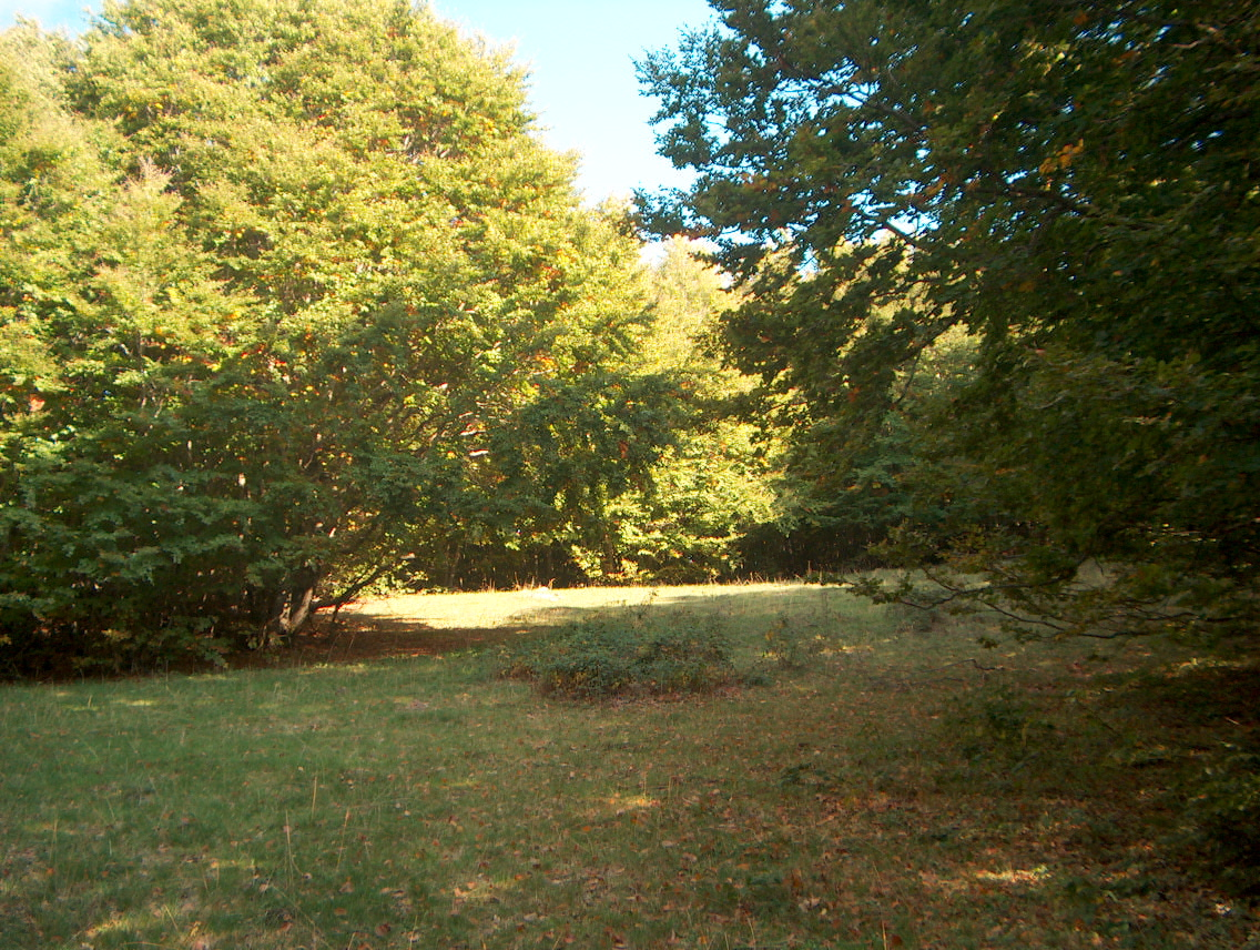 Bosco della Sila Grande. Monte Scuro in provincia di Cosenza.